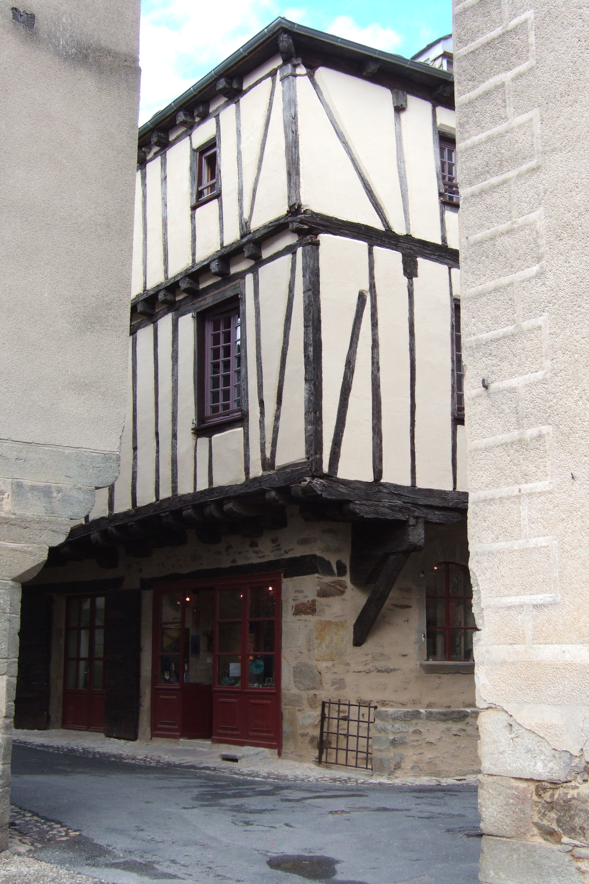 vue de l'angle nord-est de la place de Sauveterre-de-Rouergue.